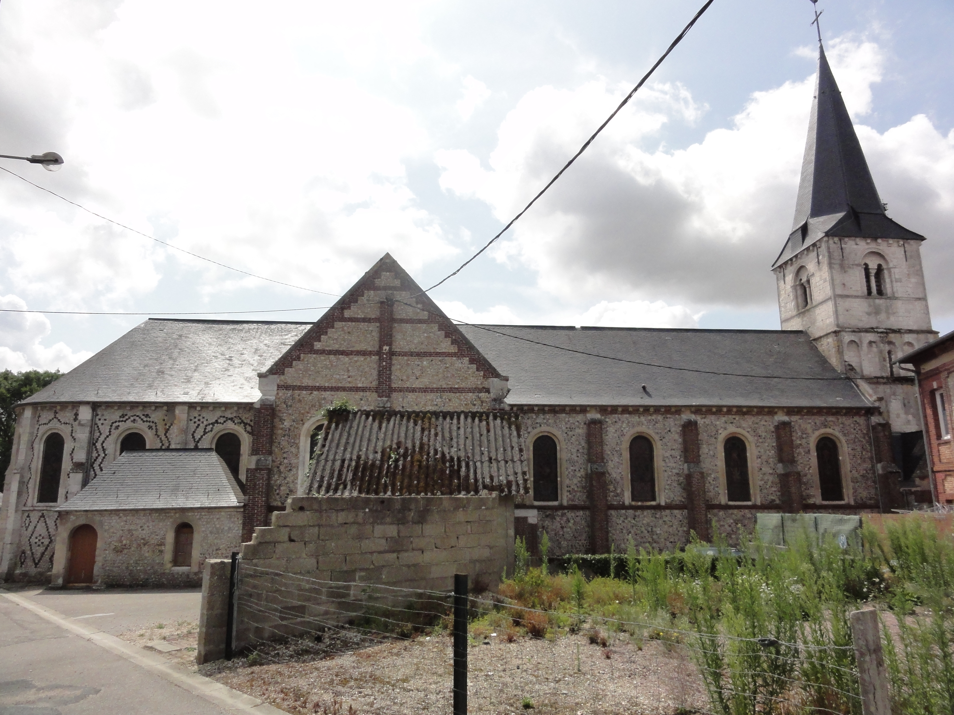 Fréville (Seine-Mar.) église